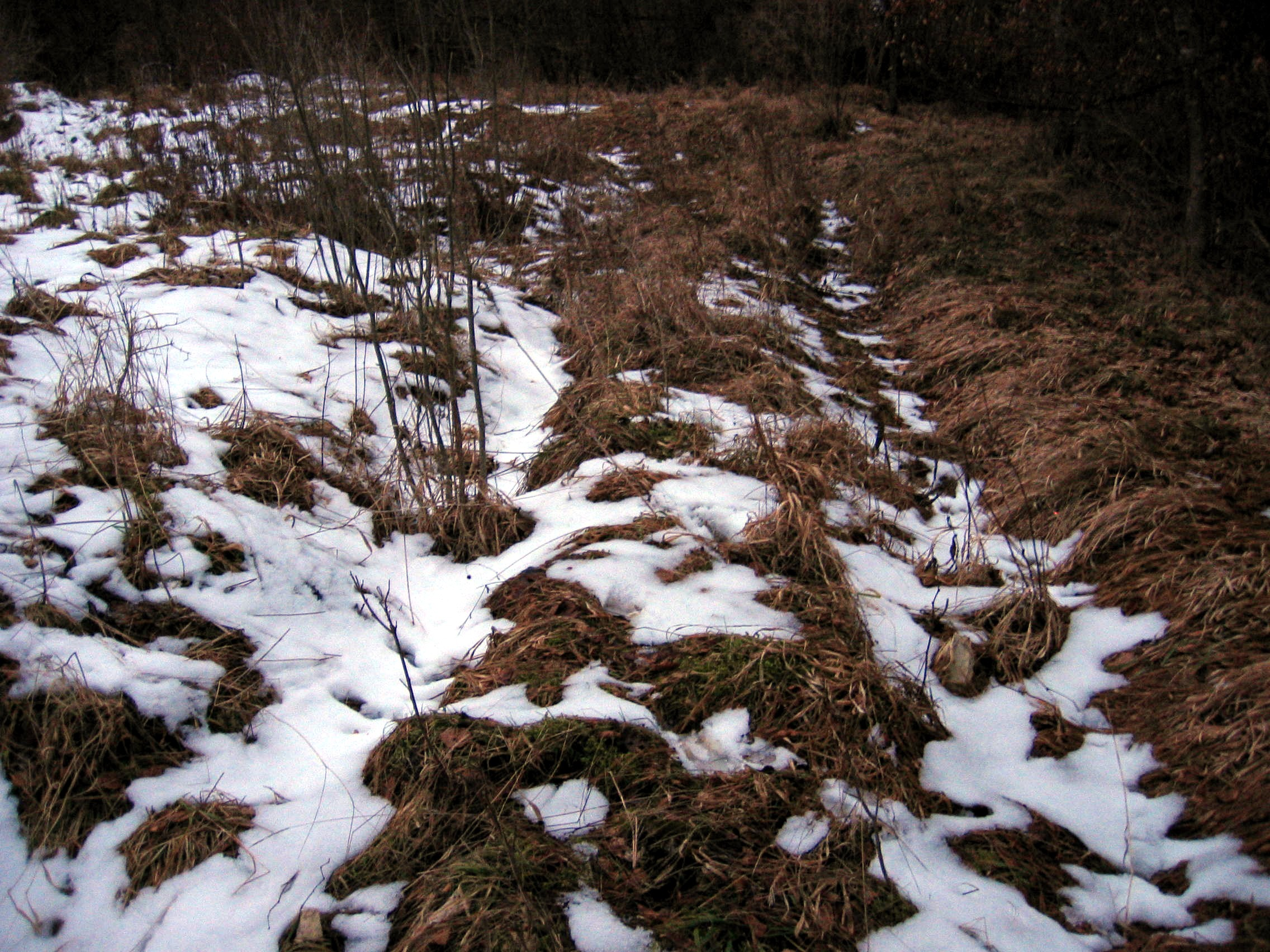 Villa Rustica von Laucherthal, nördliche Grundmauer (Aufnahme von Ost in Richtung West)